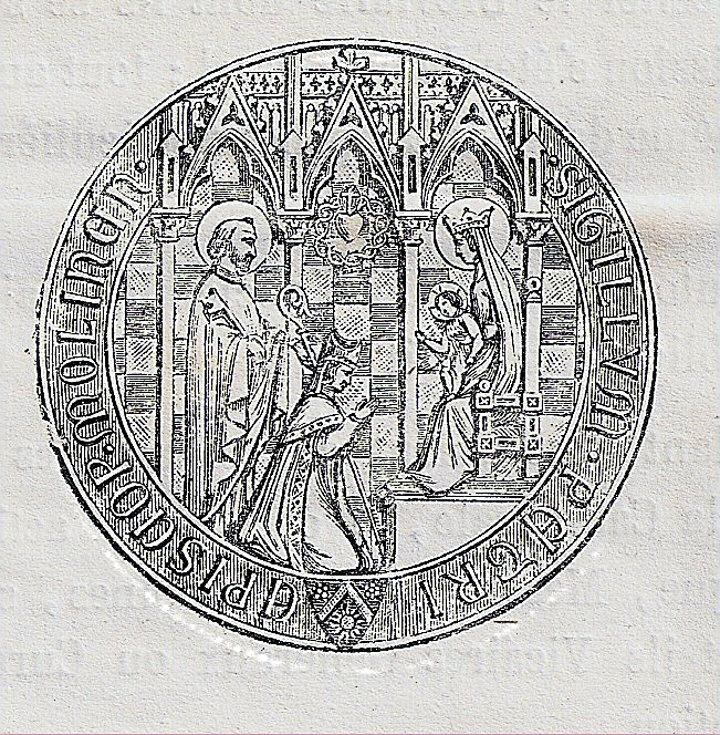 Sceau de Pierre de Dreux-Brézé, évêque de Moulins (France)